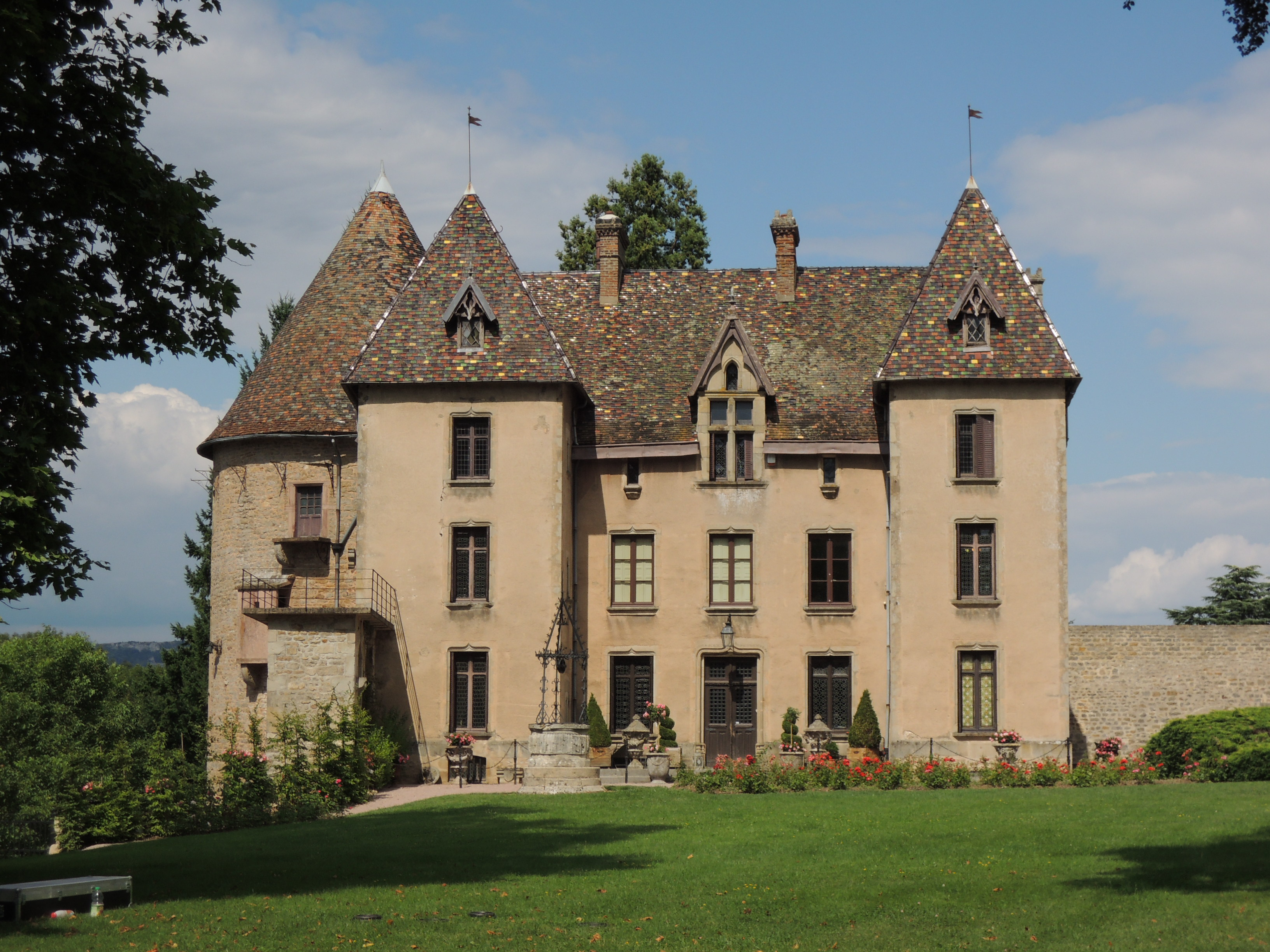 Château de Couches, Saône-et-Loire.